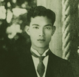 詩人丘英二(張良典)